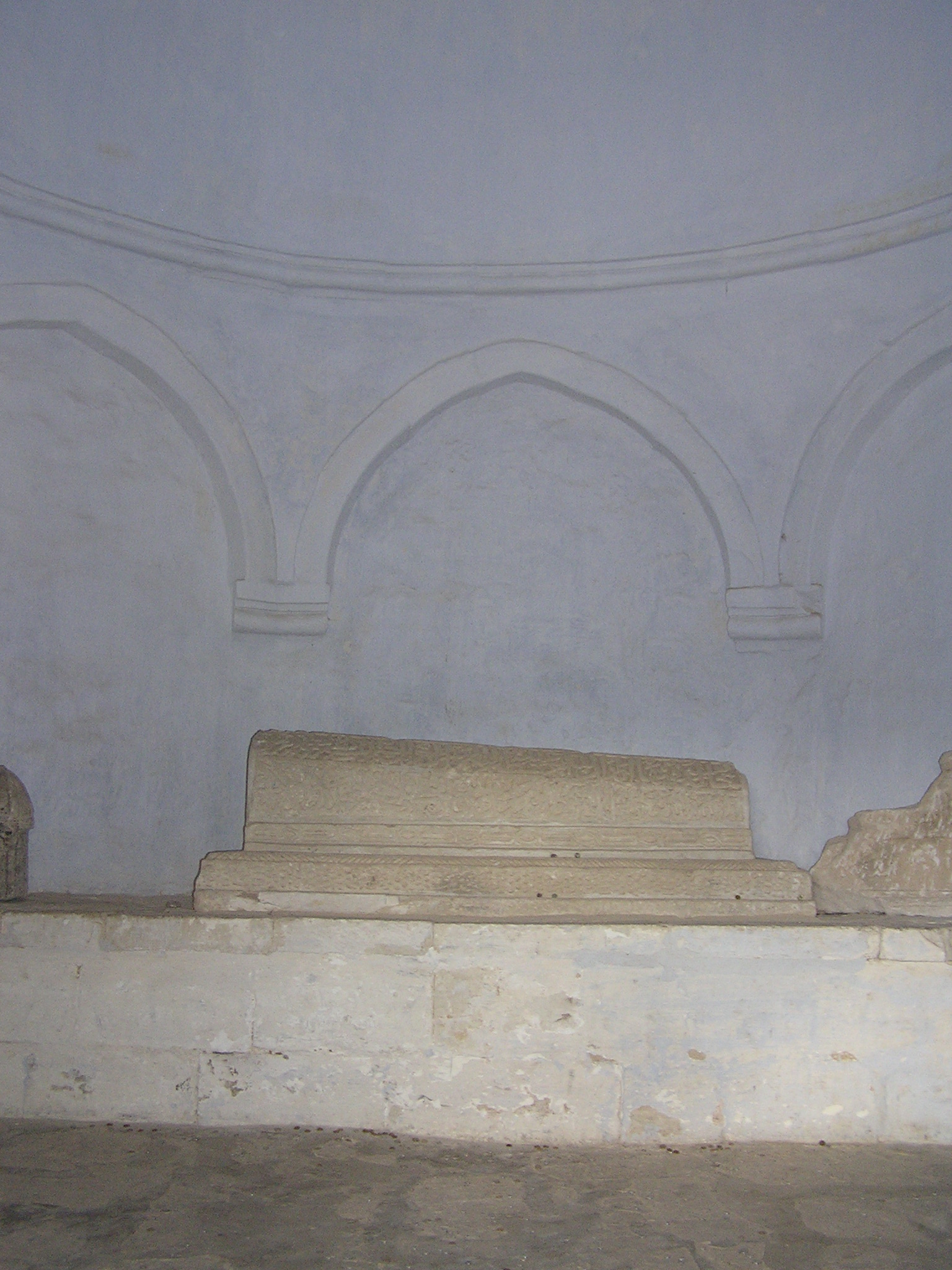 Чуфут-кале. Мавзолей Джанике-Ханым